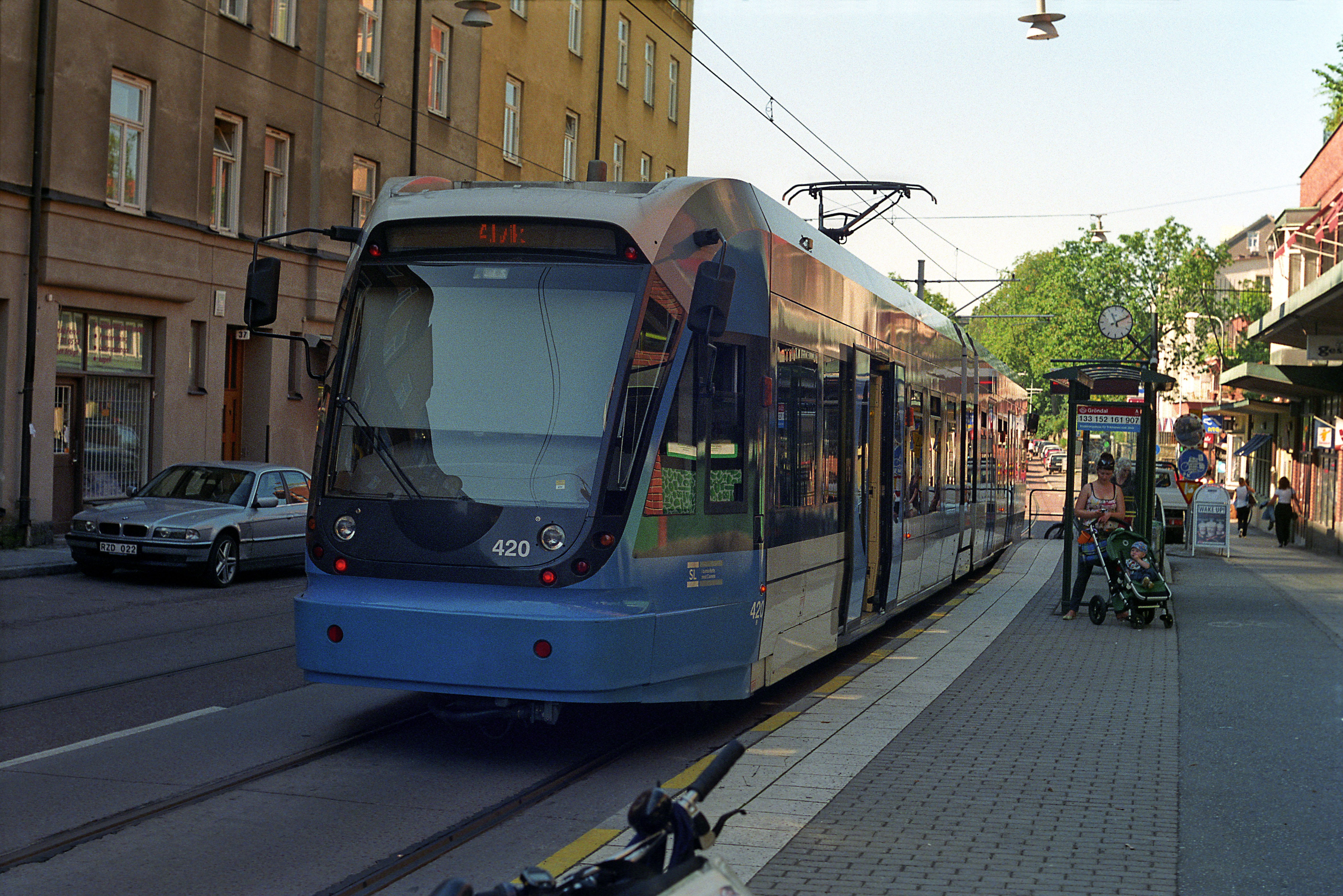 Tvärbanan-Zug im Gröndalsvägen. Zwischen Liljeholmen und der Essingebron verkehren die Züge als klassische Straßenbahn im Straßenraum und auf Sicht.